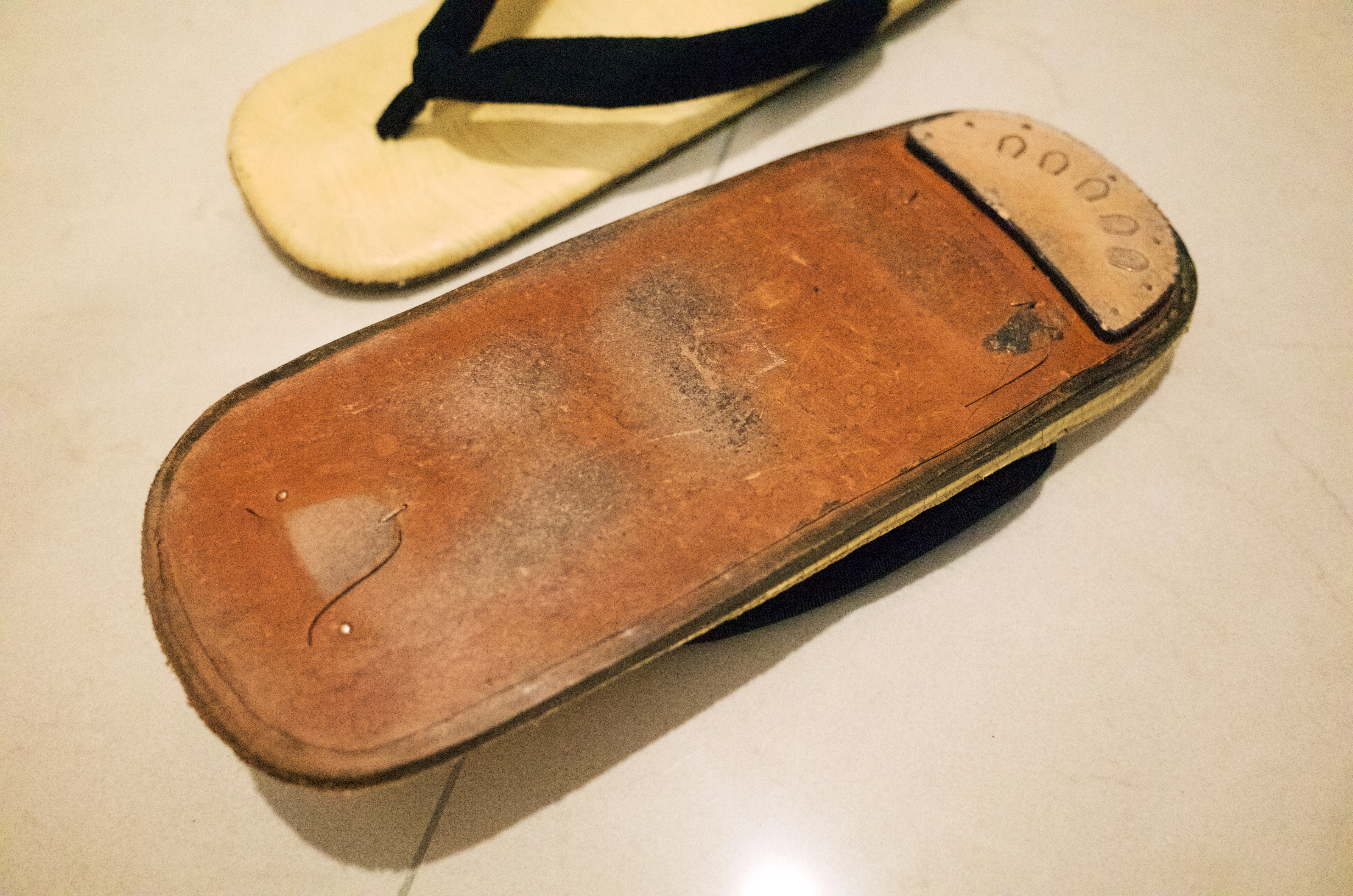 GR028934